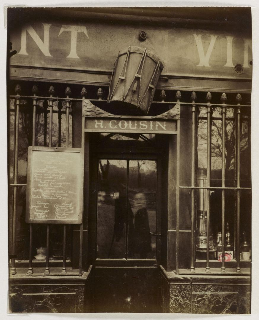 Restaurant Au Tambour, 63 Quai de la Tournelle, Paris. Unu el la plej famaj fotoj de Eugène Atget.